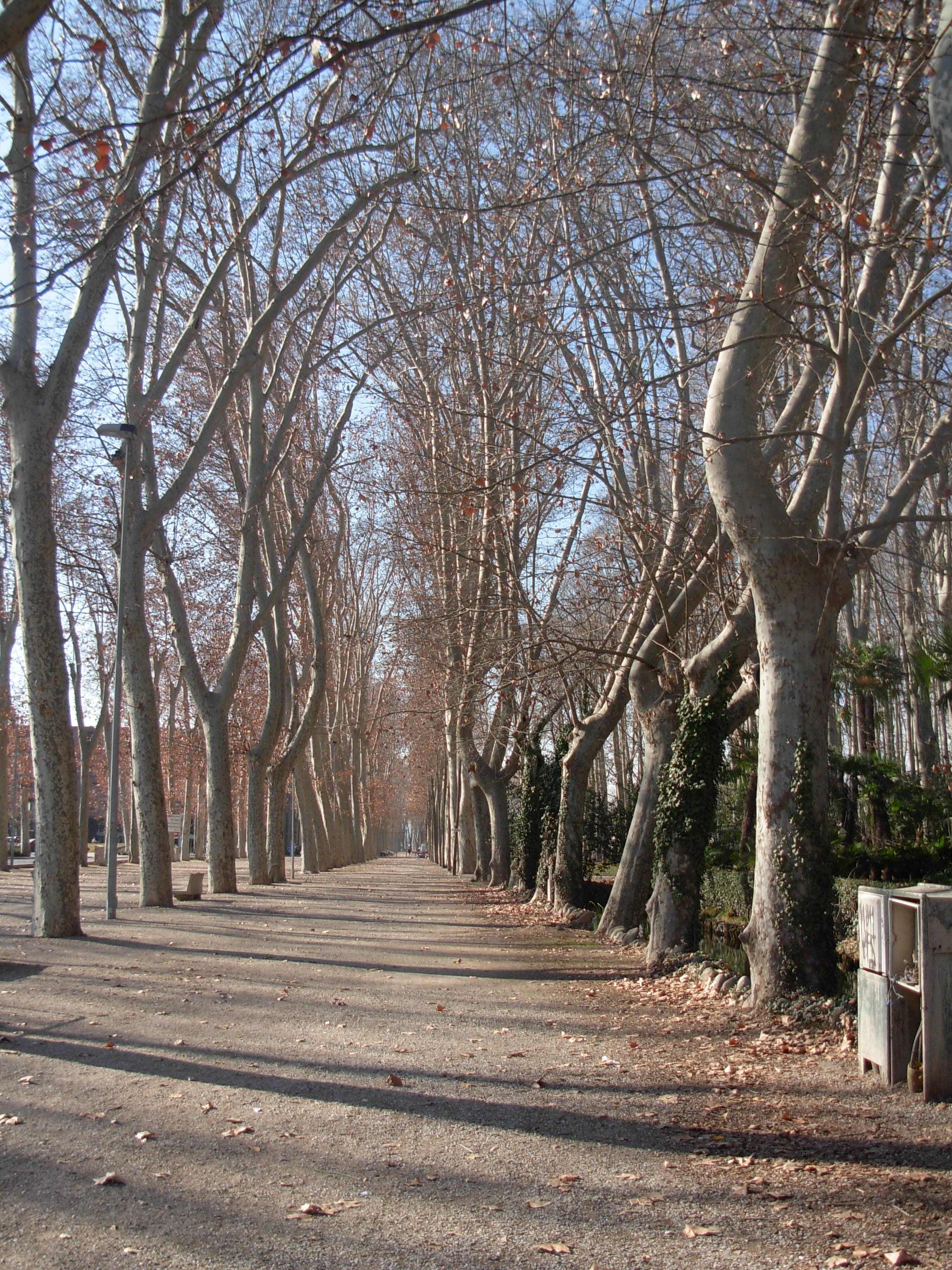 plàtans de la devesa